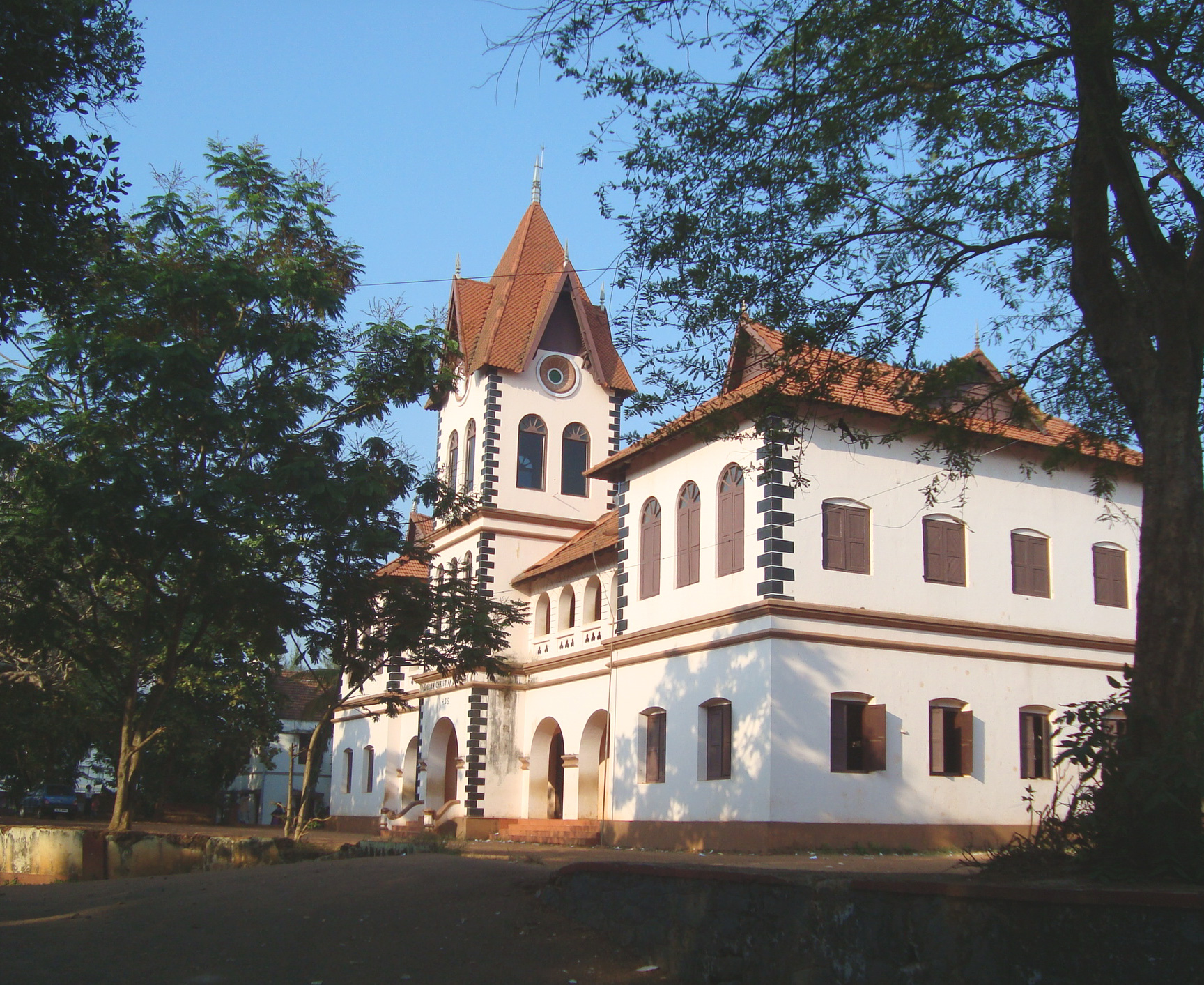 Das Gebäude des Syrian Christian Seminary am Hauptsitz der Mar Thoma Kirche in Tiruvalla, Kerala, Indien